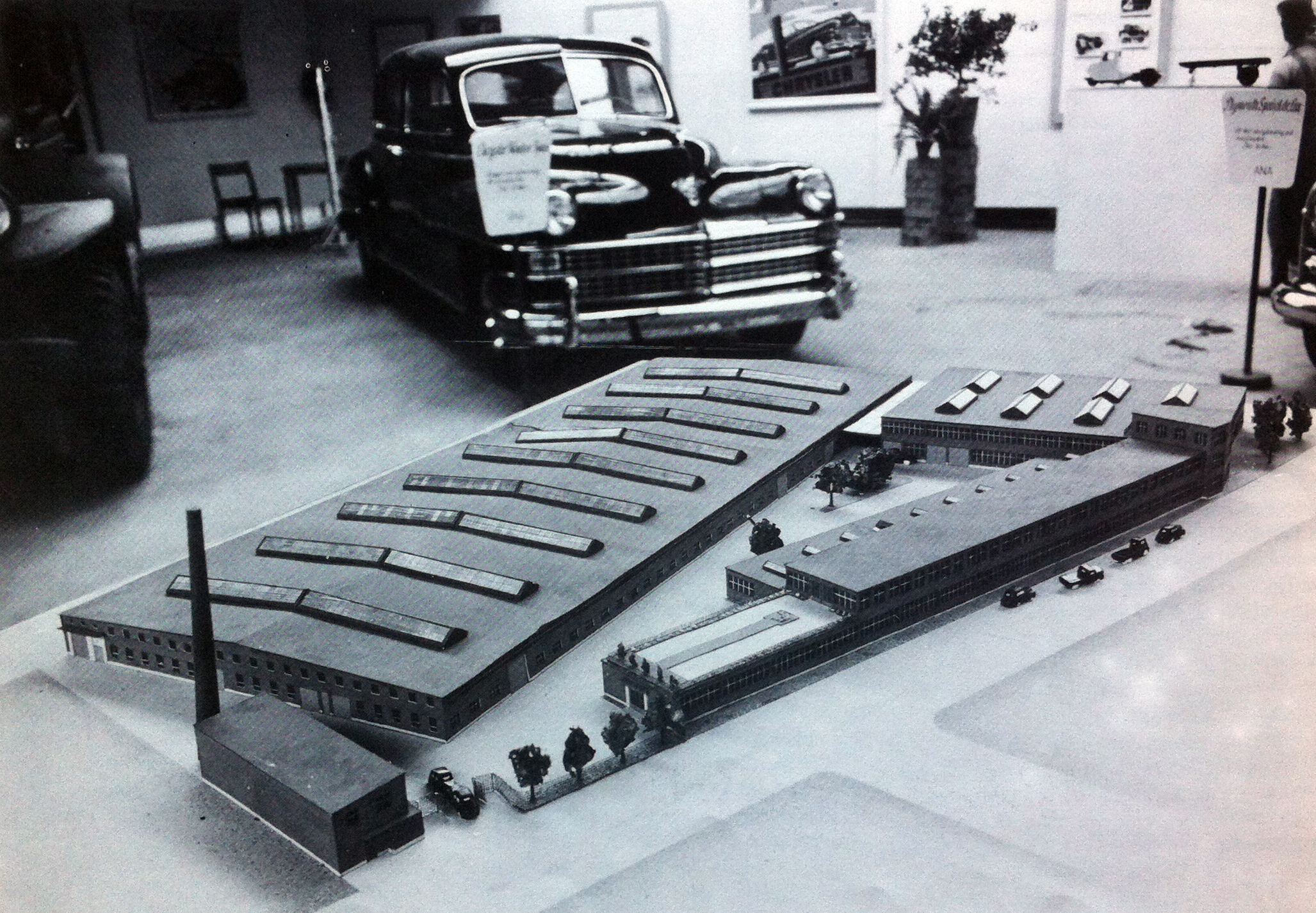 ANA-fabriken invigdes den 20 okt 1948.